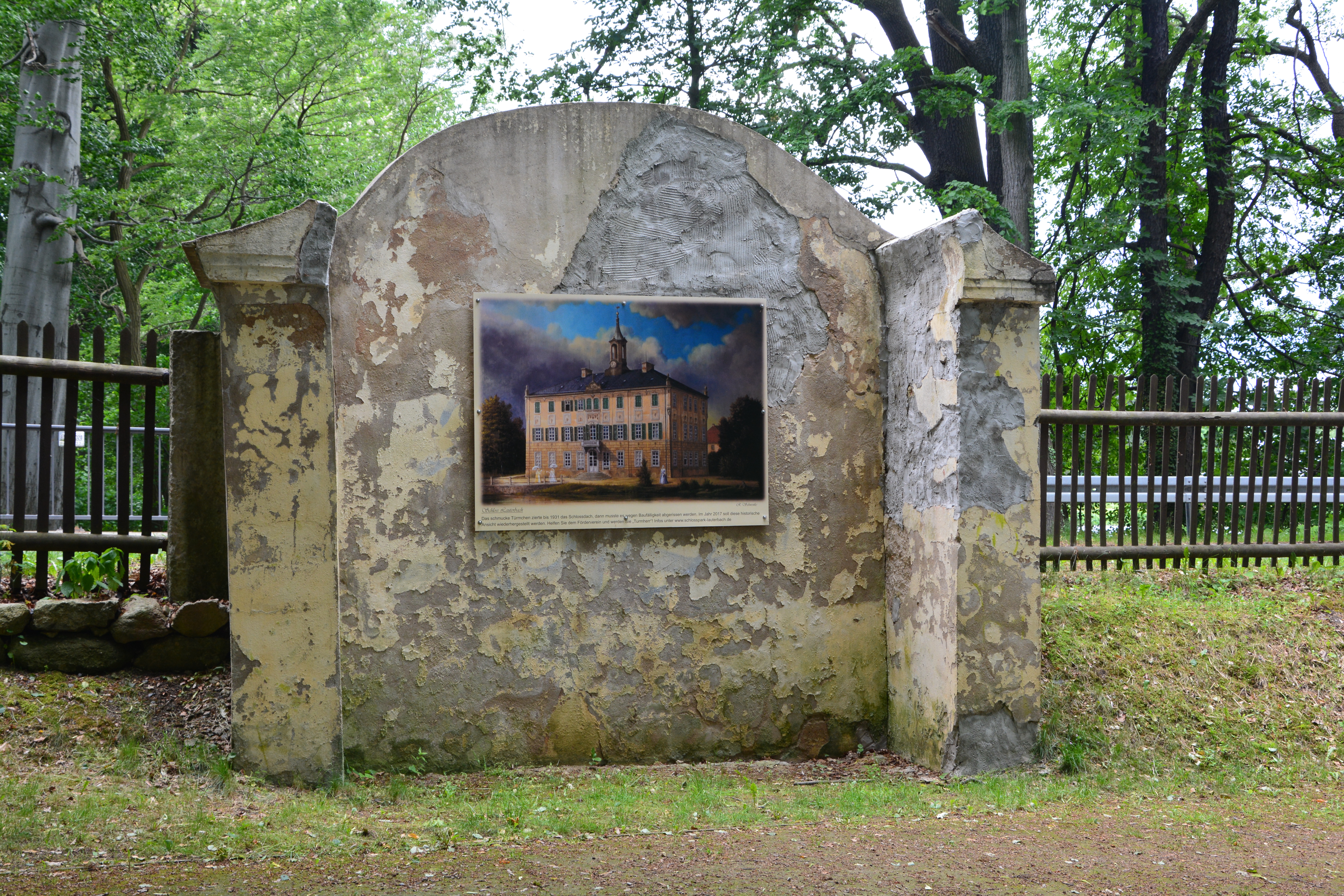 Schloss Lauterbach im Landkreis Meißen, Mai 2017, Mauernische eines ehemaligen Laubenganges mit Schlossbild